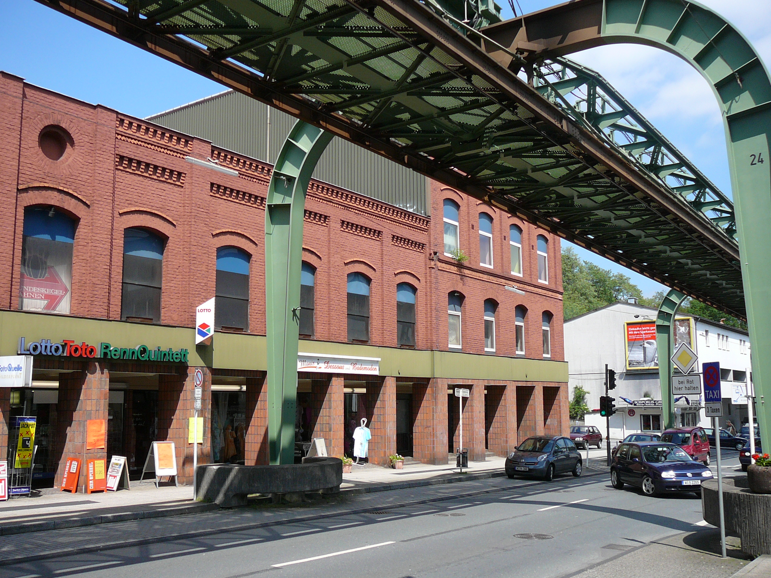 Gebhardgebäude, Kaiserstraße, Wuppertal